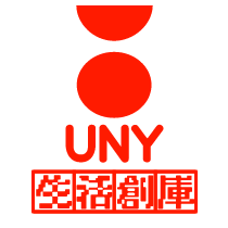 UNY 生活倉庫